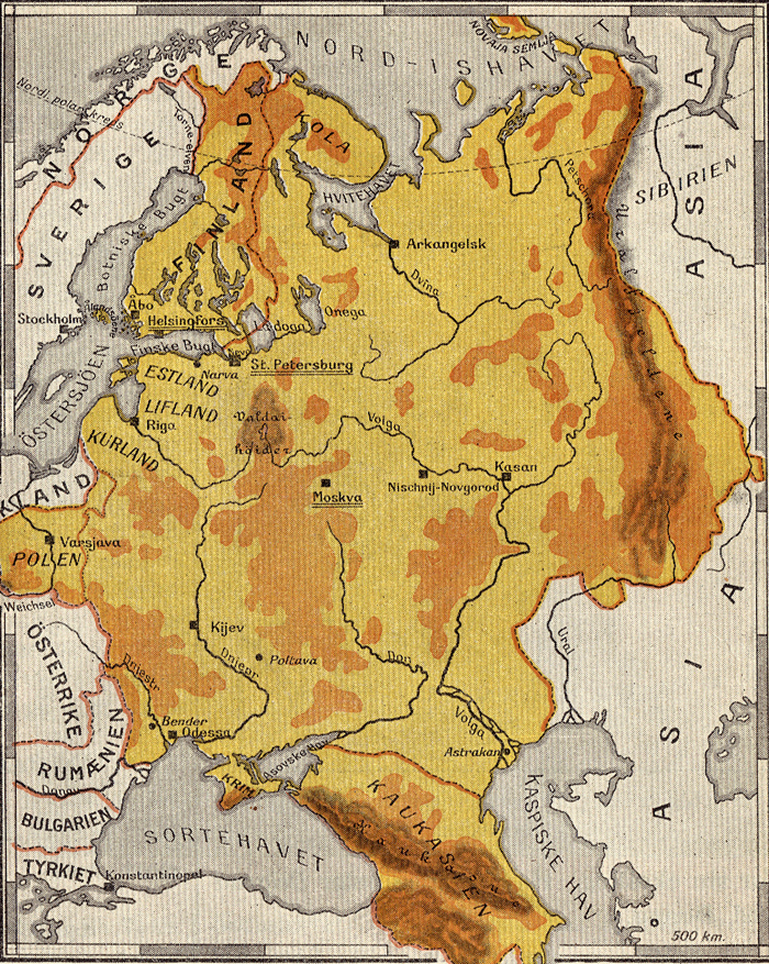 Russland (europeisk del), 1914.